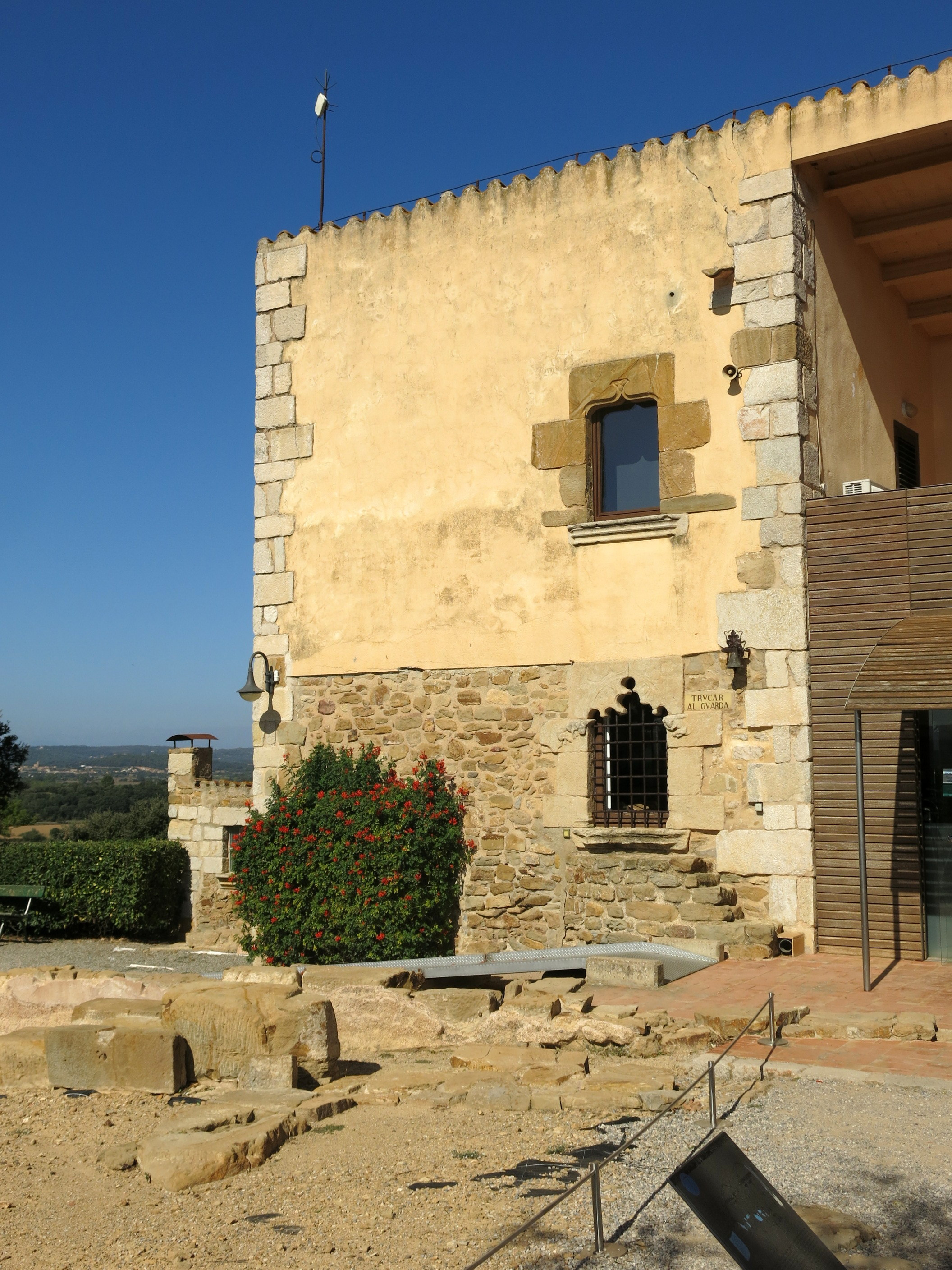 castell de Sant Andreu al poblat d' Ullastret - Baix Empordà - Catalunya